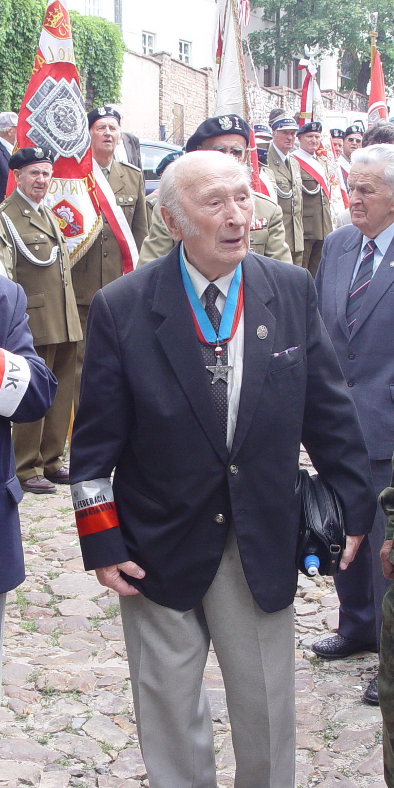 Antoni Heda-Szary, przed Muzeum w Kielcach, 60 rocznica rozbicia więzienia kieleckiego, 7 sierpień 2005r.